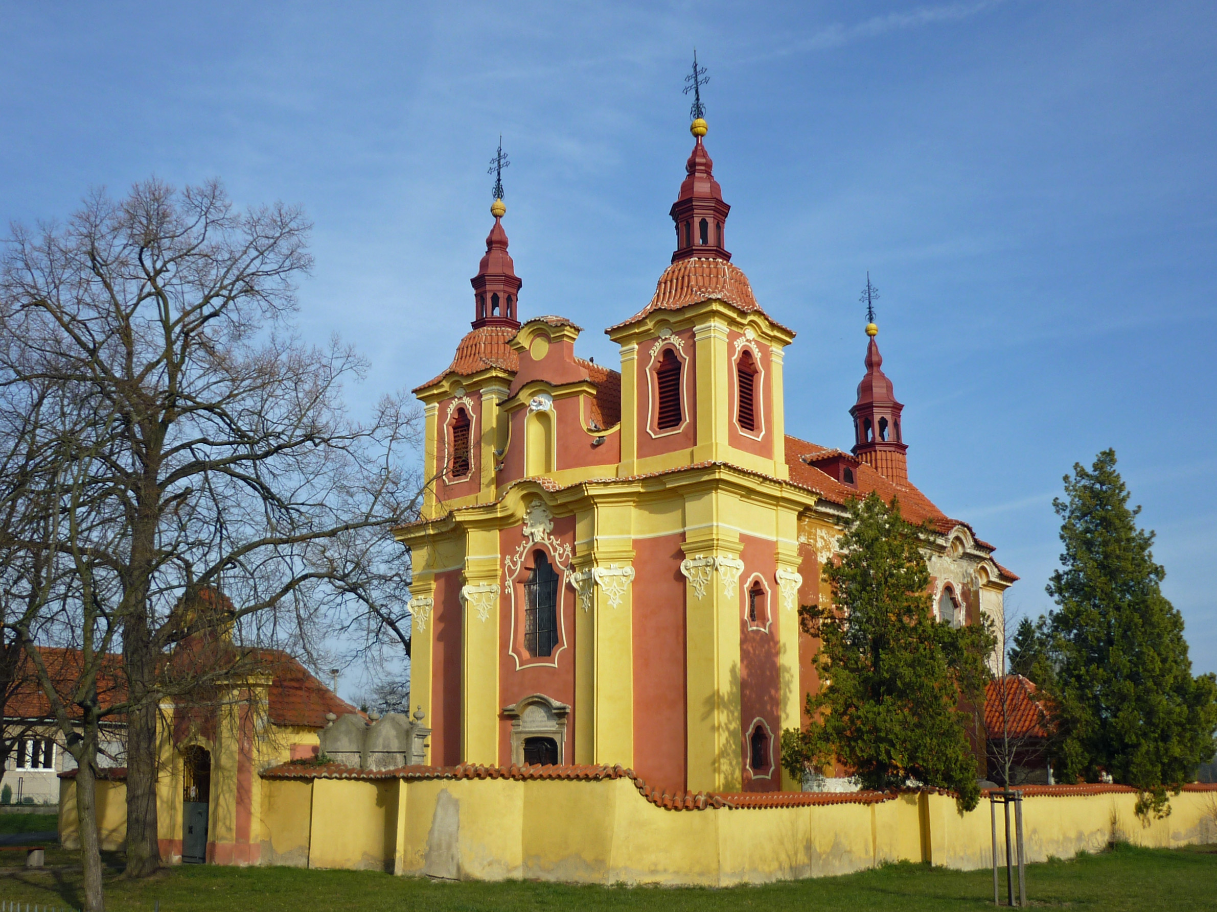 St. Wenzelskirche in Neusattel (Nové Sedlo) bei Saaz (Žatec)